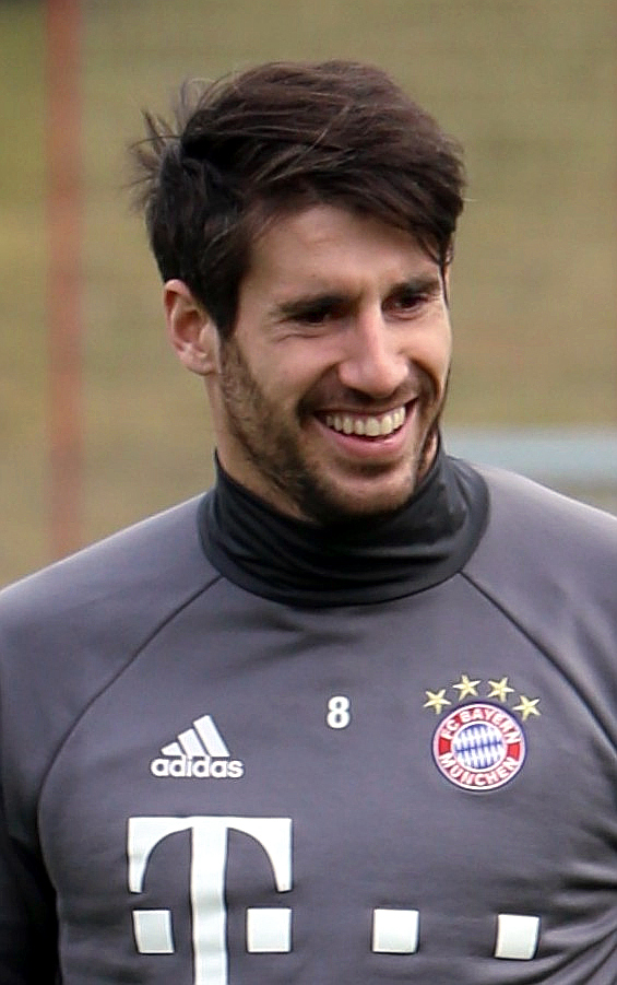 Javi Martínez, am 14. März 2017 beim Training auf dem Gelände des FC Bayern München